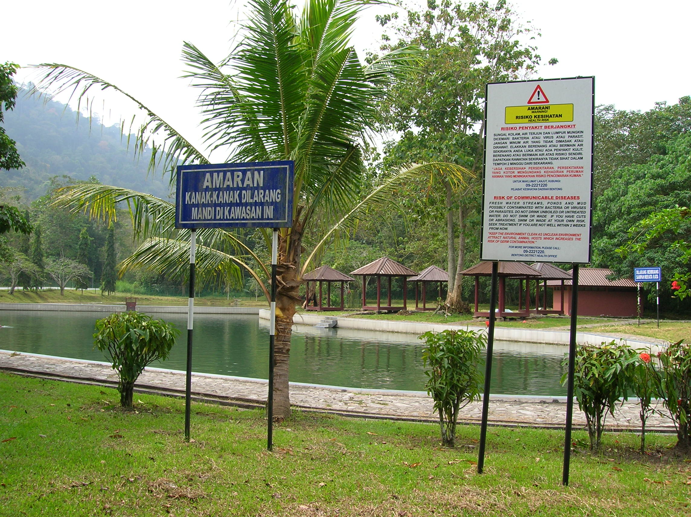 Papan tanda amaran untuk kanak-kanak, dan risiko kesihatan.